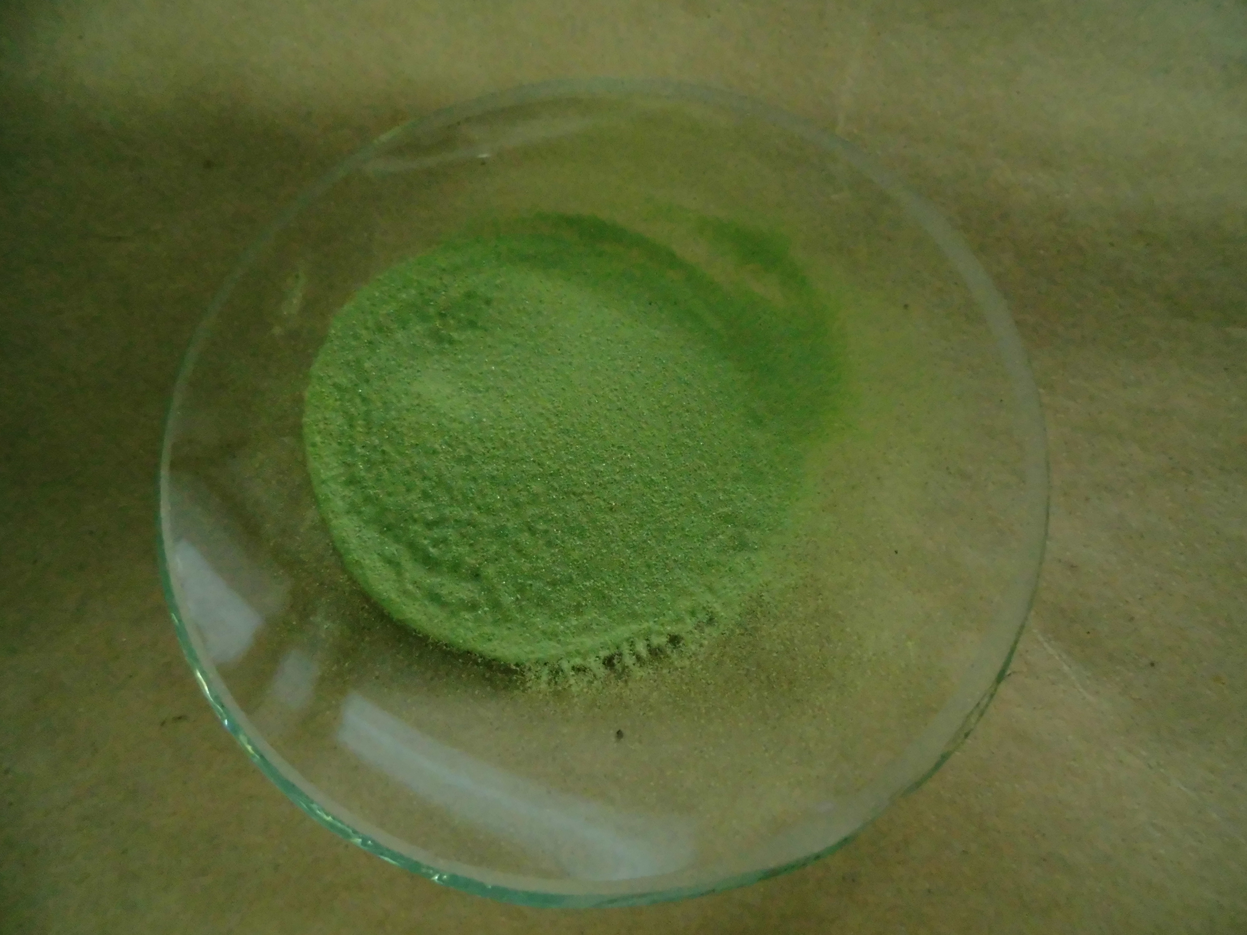 三氧化钨粉末。